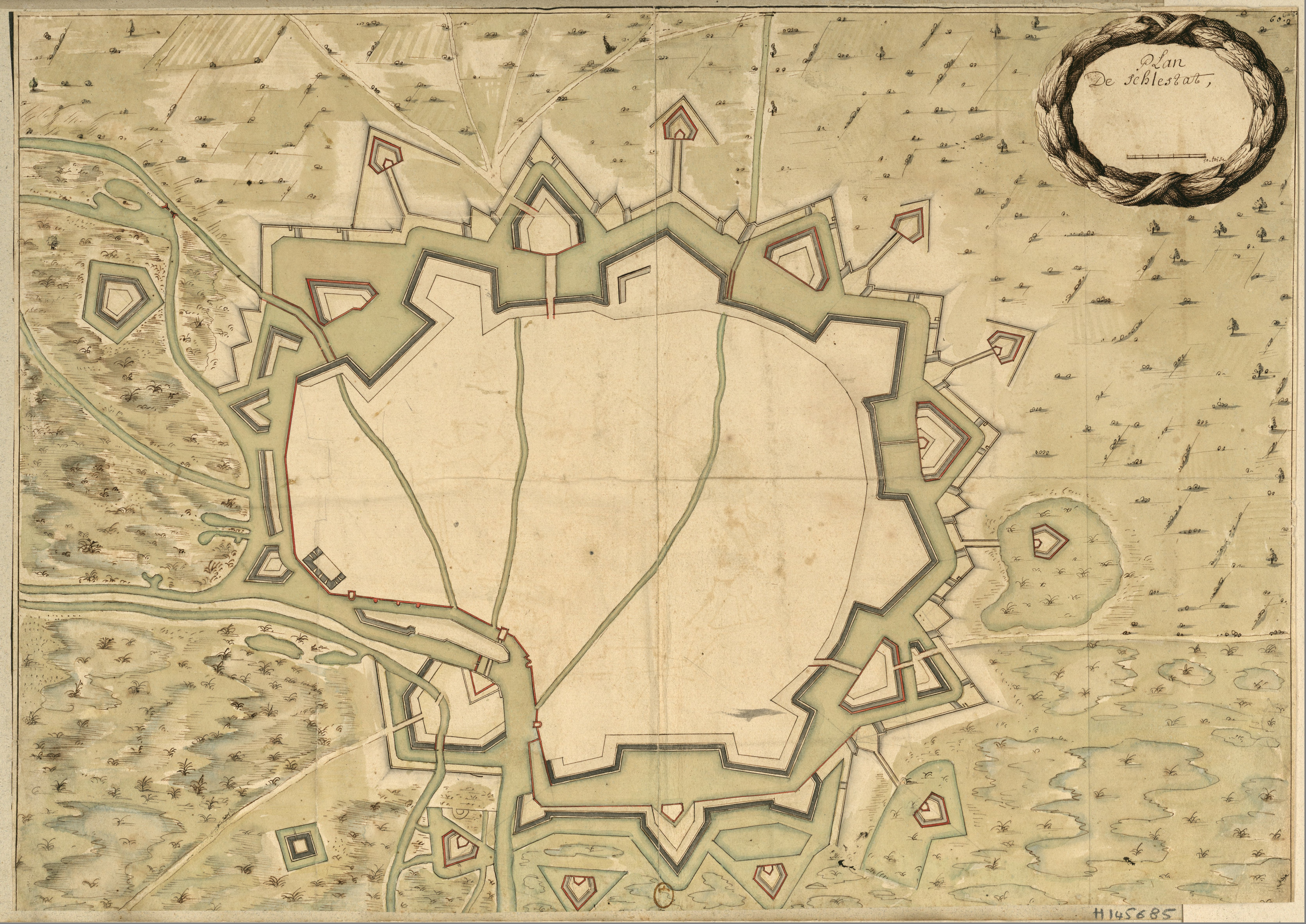 Plan de Schlestadt : [dessin]. 17e siècle